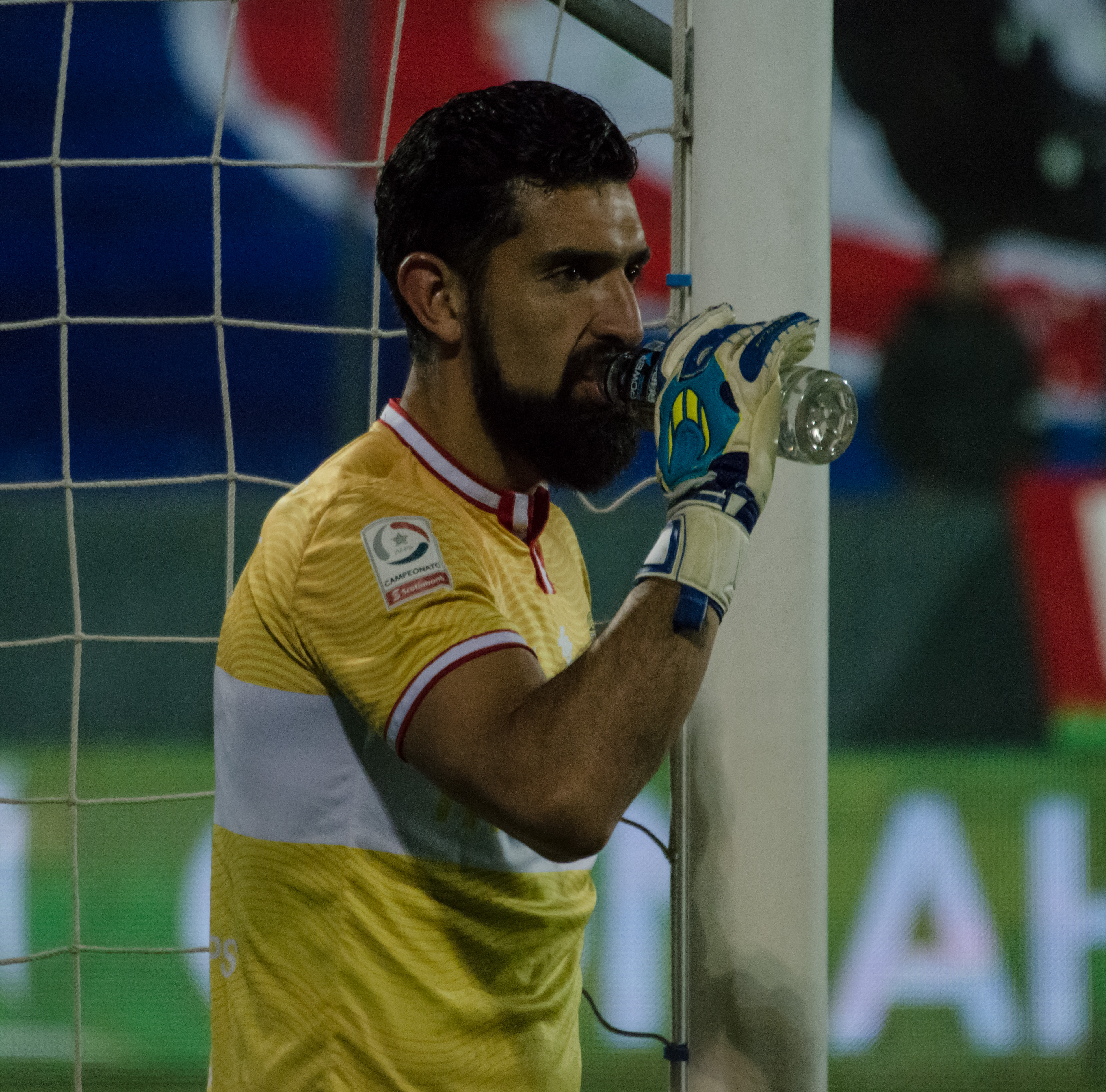 Jorge Deschamps, Unión Española v Curicó Unido, Estadio Santa Laura, Independencia, Santiago, Chile